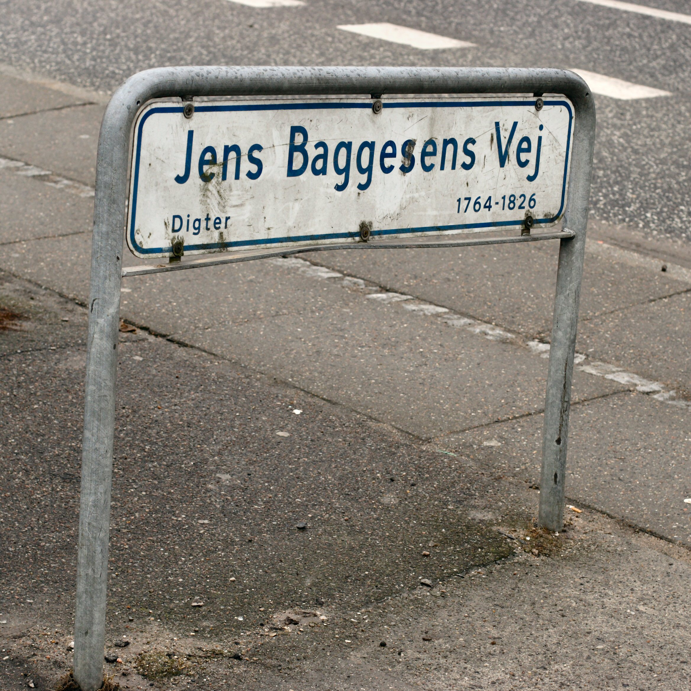 gadenavneskilt fra Århus.